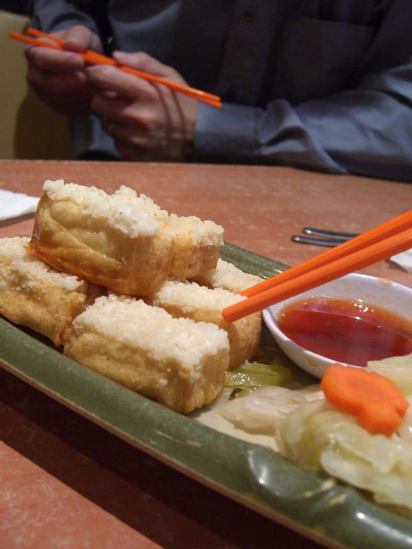 Deep Fried Tofu